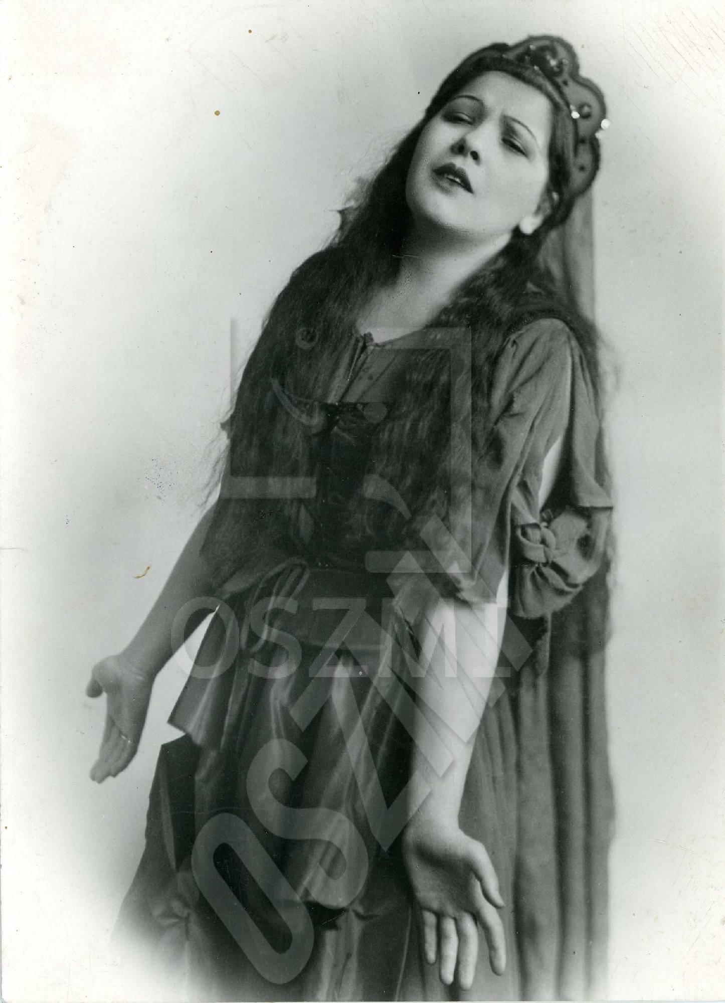 Tőkés Anna a Magyar Elektra címszerepében a darab ősbemutatóján.